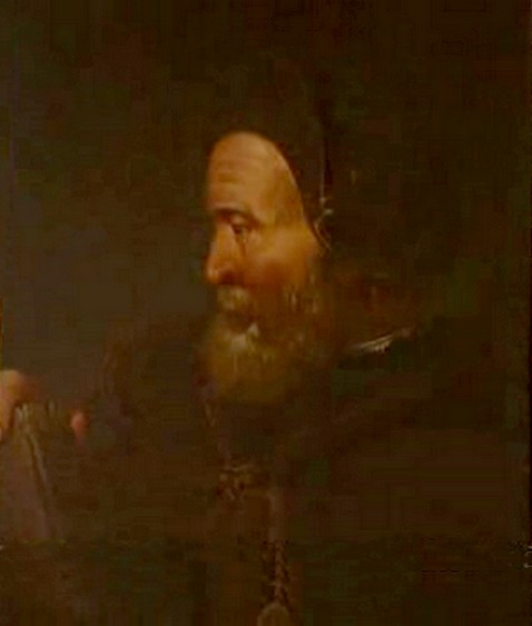 Portrait supposé de Côme Ruggieri.